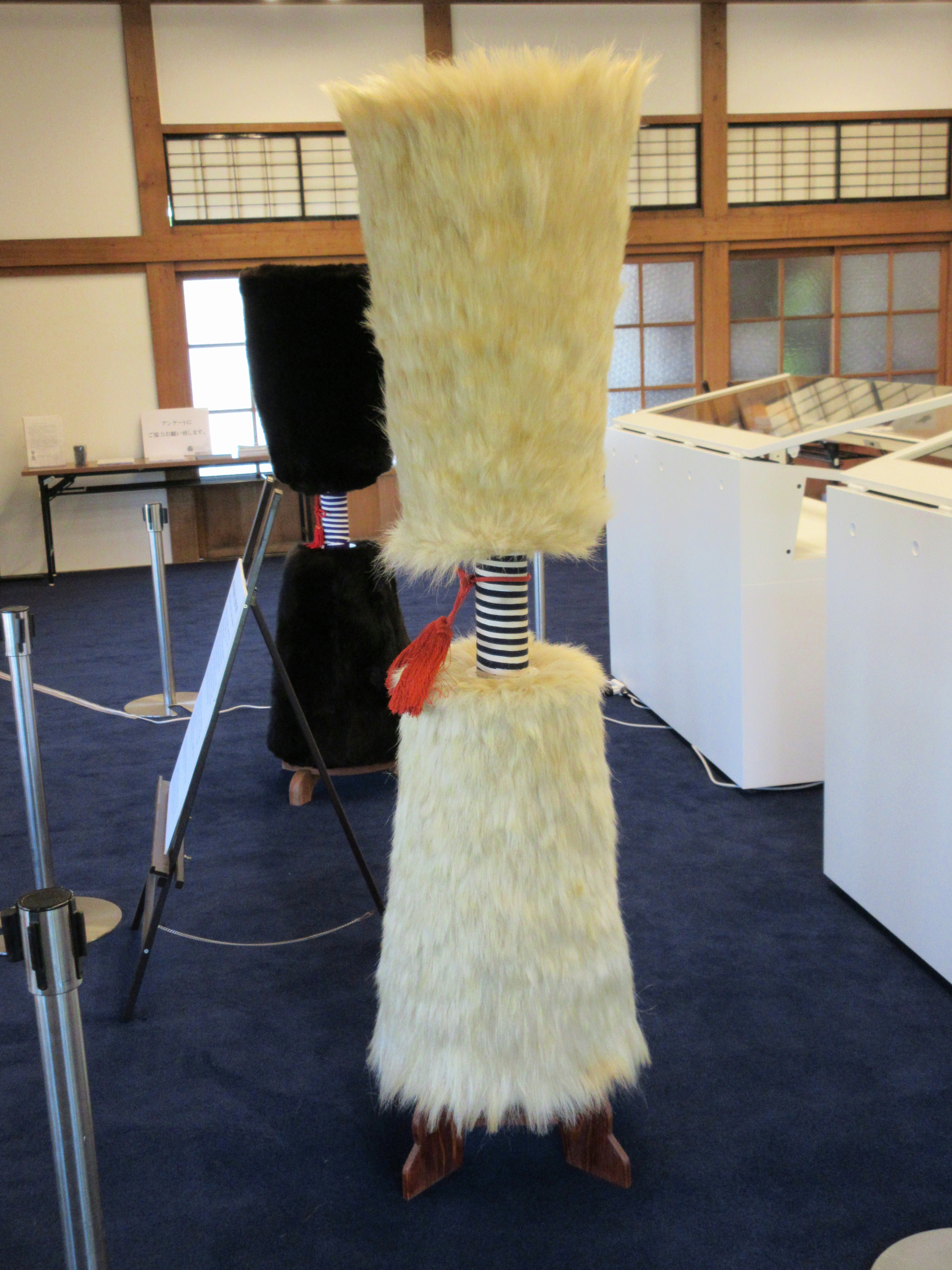 旧前橋藩世子、松平斉省の馬印を復元したものである。